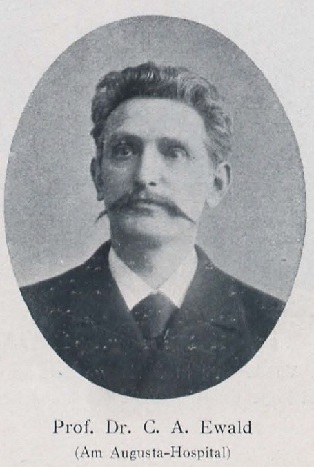 Carl Anton Ewald (1845-1915), deutscher Mediziner, leitender Arzt am Kaiserin-Augusta-Hospital in Berlin.